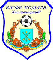 Емблема ФК Поділля-Хмельницький.png: Ембема КП ФК "Поділля-Хмельницкий"